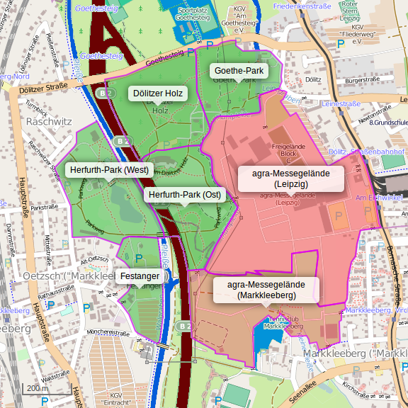 Diese Karte zeigt die Teilbereiche des agra-Parks und des agra-Messegeländes in Leipzig bzw. Markkleeberg, sie ist ein abgeleitetes Werk, basierend auf Open-Street-Map Daten. Wegen der Verwendung der Hintergrundkacheln des OSM-Projekts, ist die Lizenz auf CC-by-sa festgeschrieben.